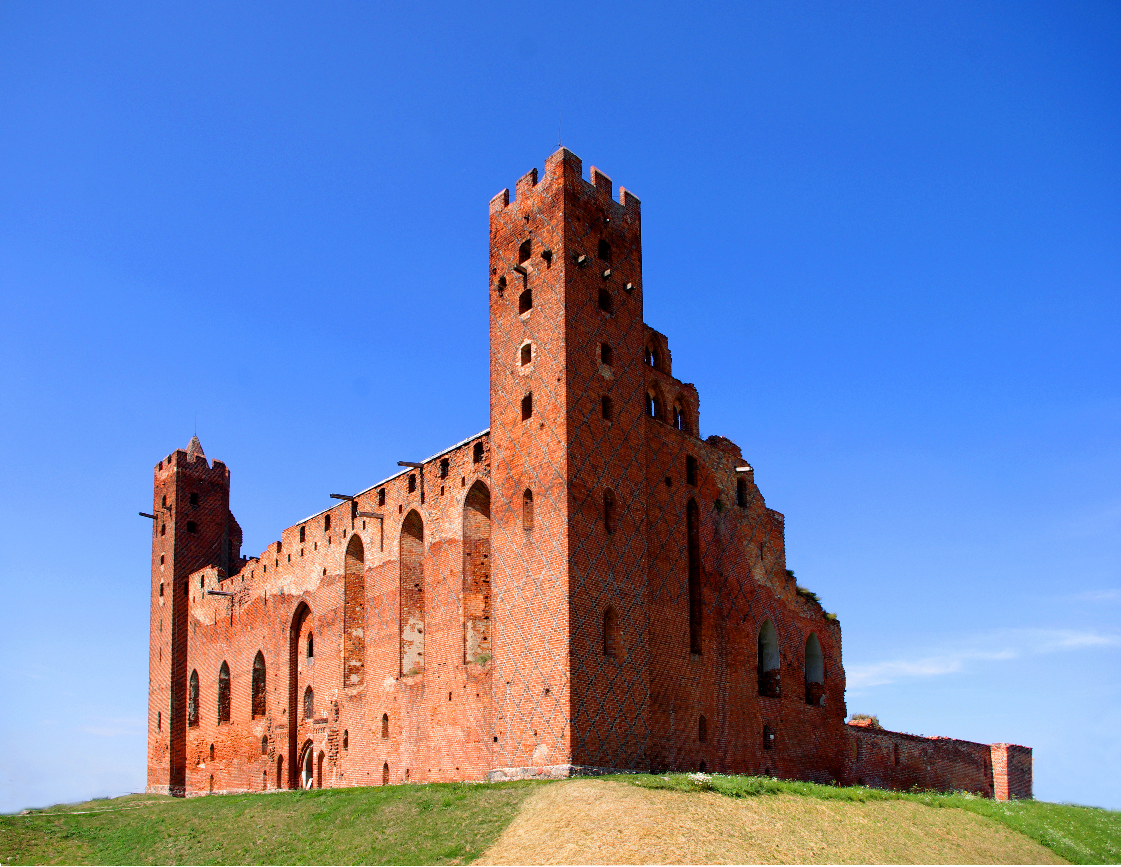 Radzyń Chełmiński, ruiny zamku, 2 poł. XIII - 1 poł. XIV